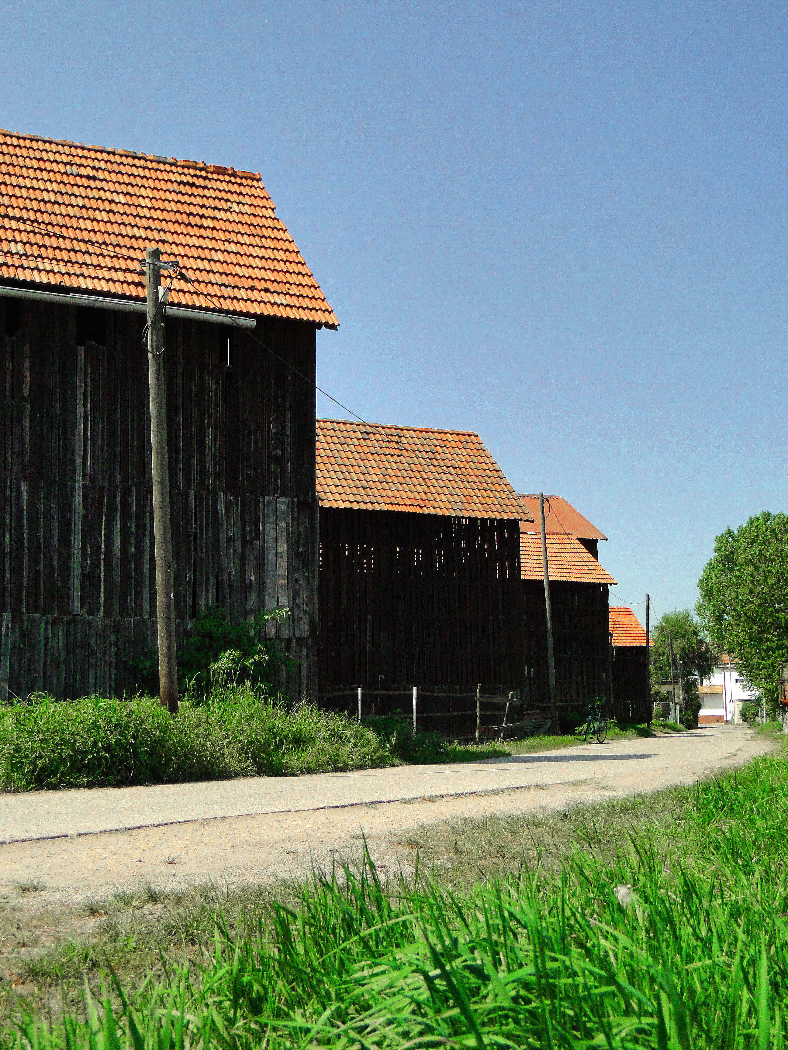 Alte Tabaktrockenschuppen an der westlichen Seite des Bruchwegs in Herxheim bei Landau